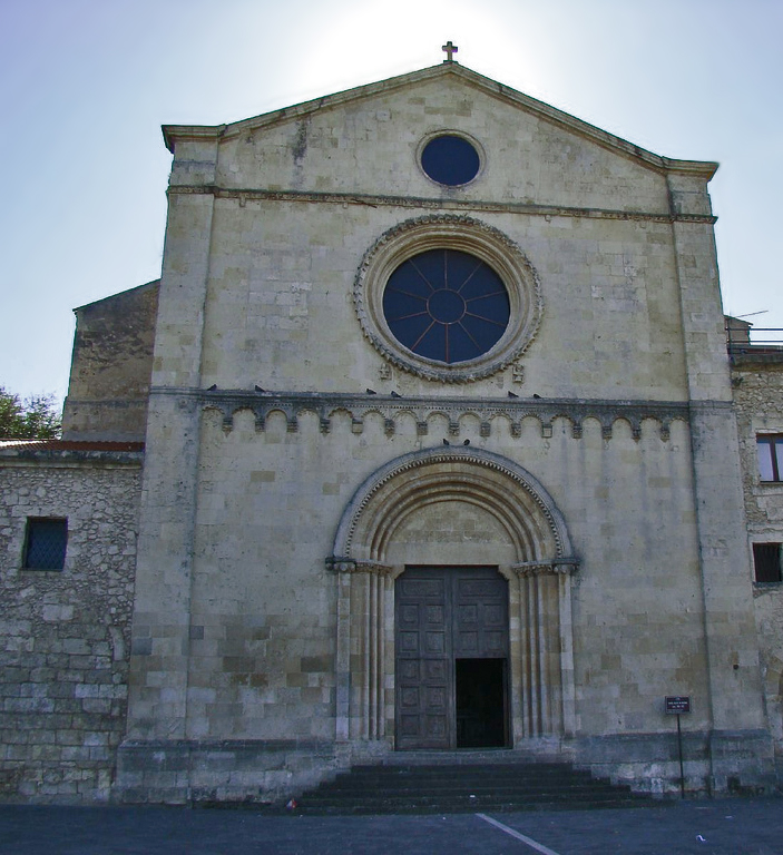 Chiesa di Santa Maria in Betlem. La chiesa di Santa Maria in Betlem dove ha luogo lo scioglimento del voto. Facciata romanico-lombarda della chiesa di Santa Maria di Betlem a Sassari. Santa Maria di Betlem.